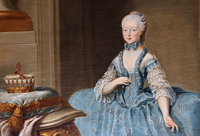 Maria Joanna of Austria in a blue dress